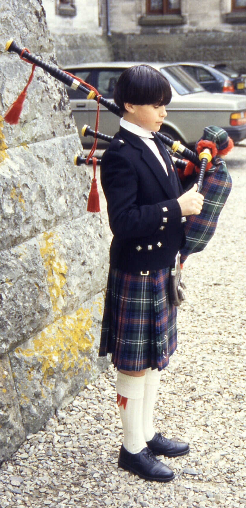 DudelsackpfeiferSchottland1997